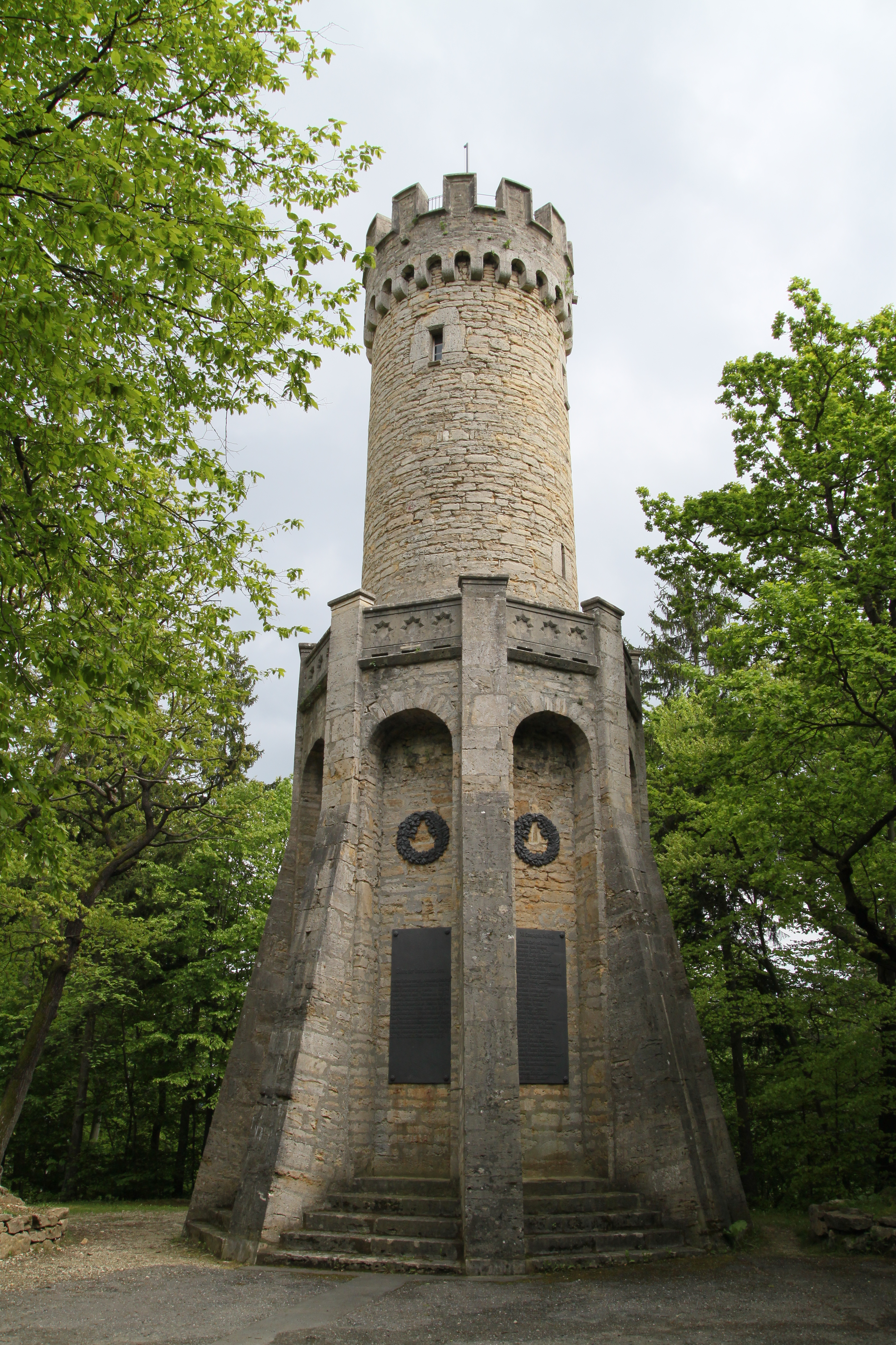 Forstturm auf dem Forst in Jena